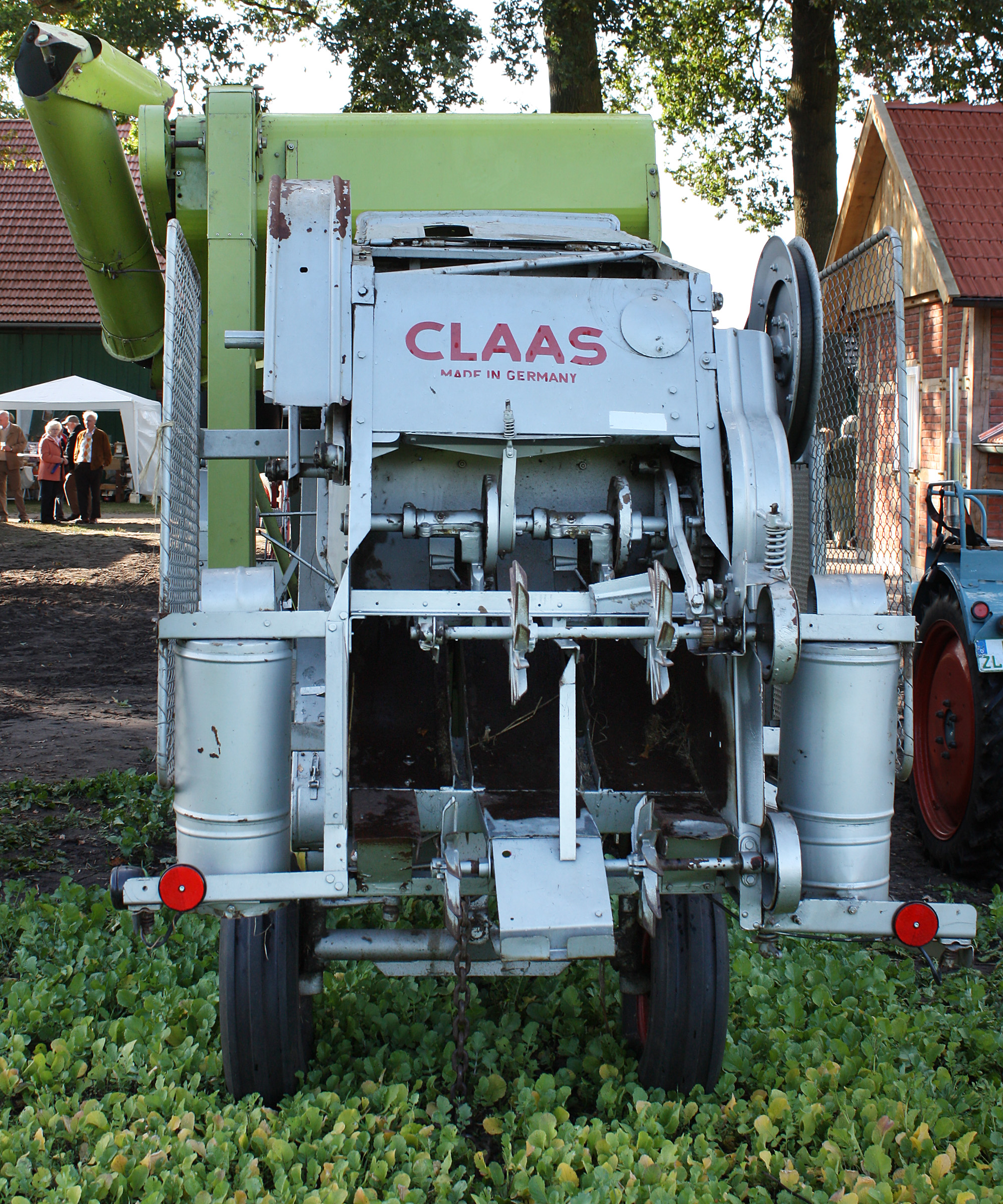 Claas Columbus mit angabuter Niederdruckballenpresse